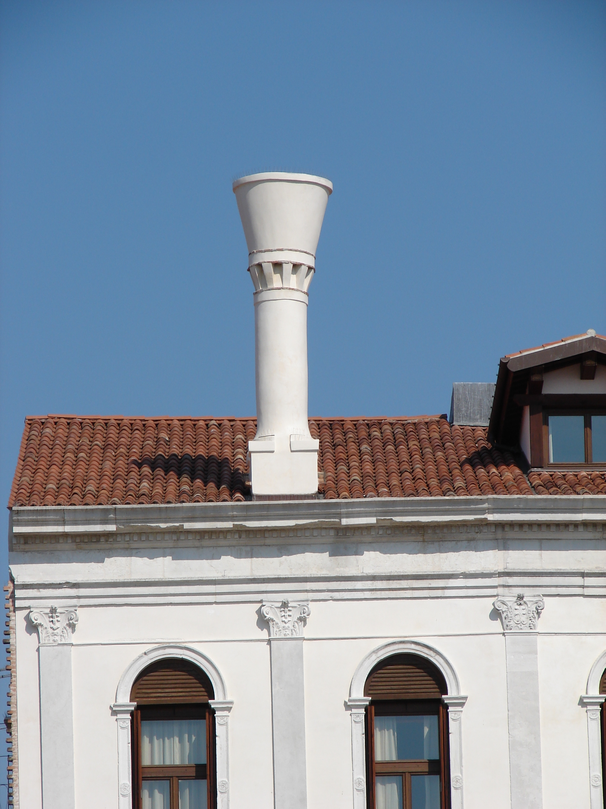 Schornsteinkopf Venedig, Italien